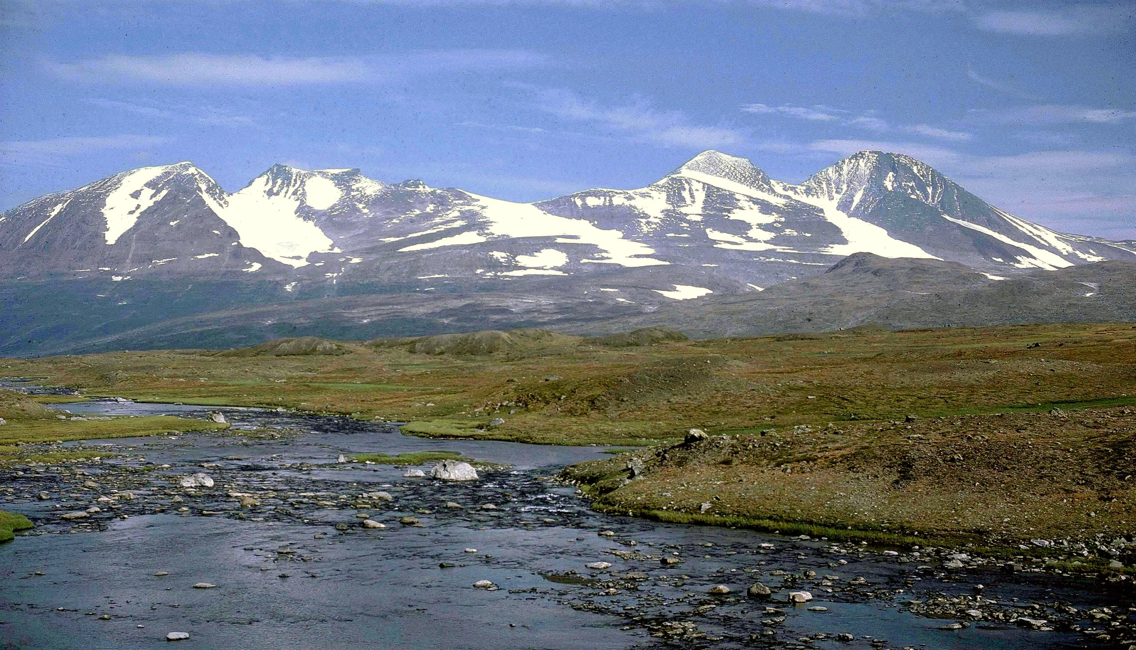 Akkamassivet